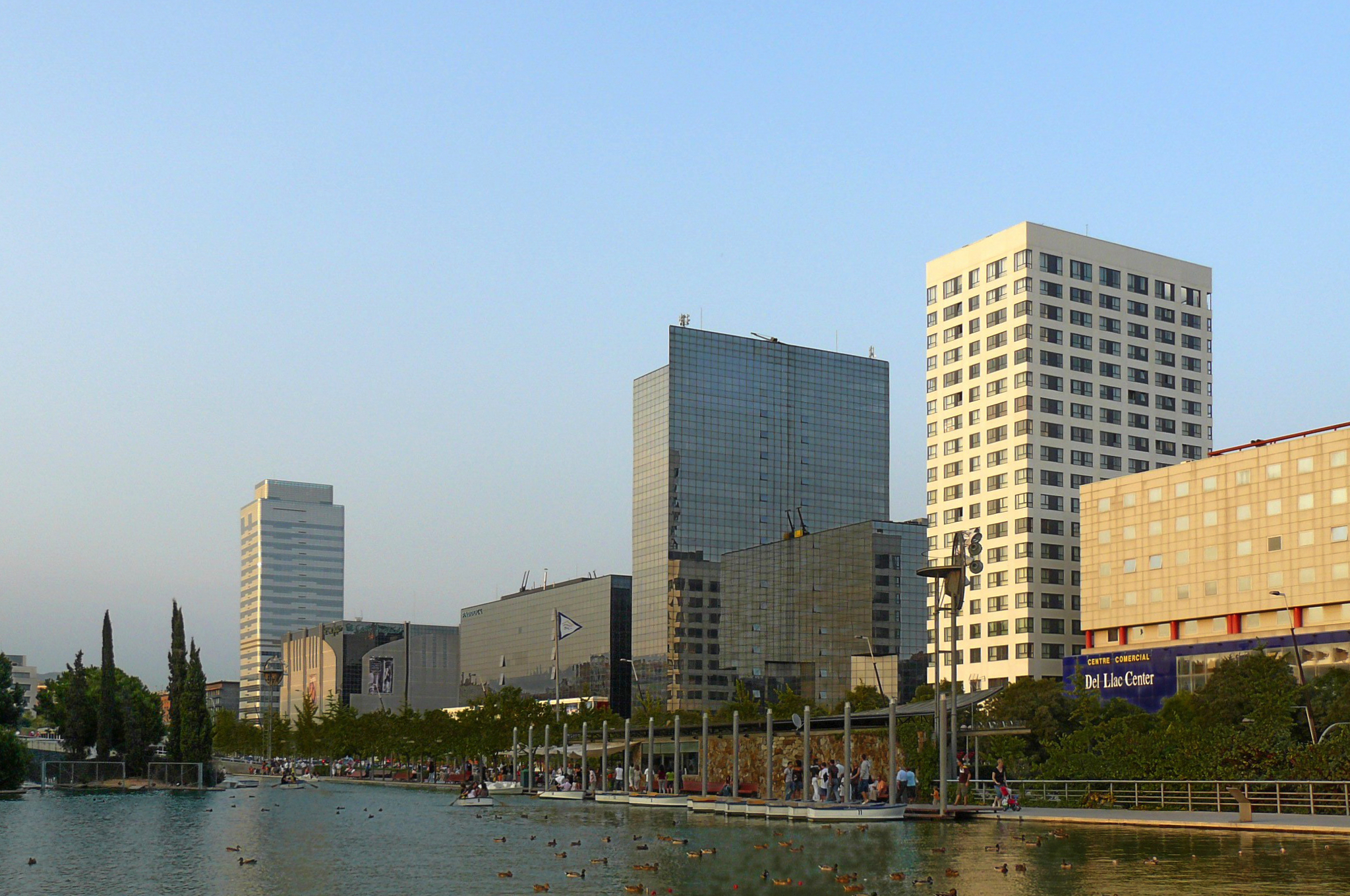 Edificis de l'eix Macià (Sabadell).